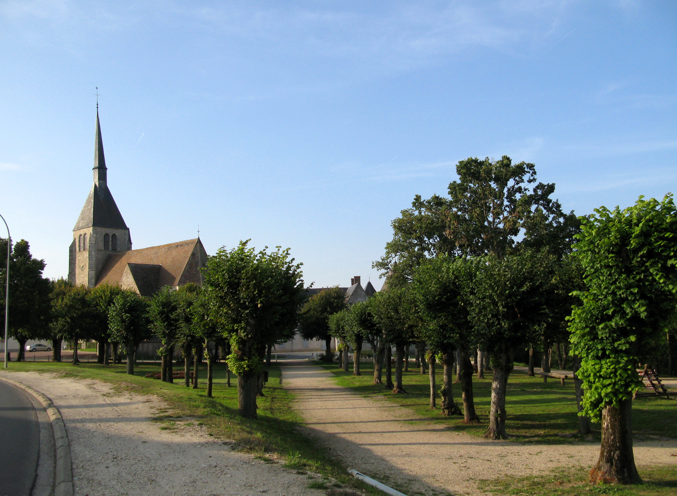 Argent-sur-Sauldre (Cher, France) - La Place de l'Abbé Lauzier et l'église. Vue depuis la Rue Nationale (route départementale D940), en direction du Nord. .